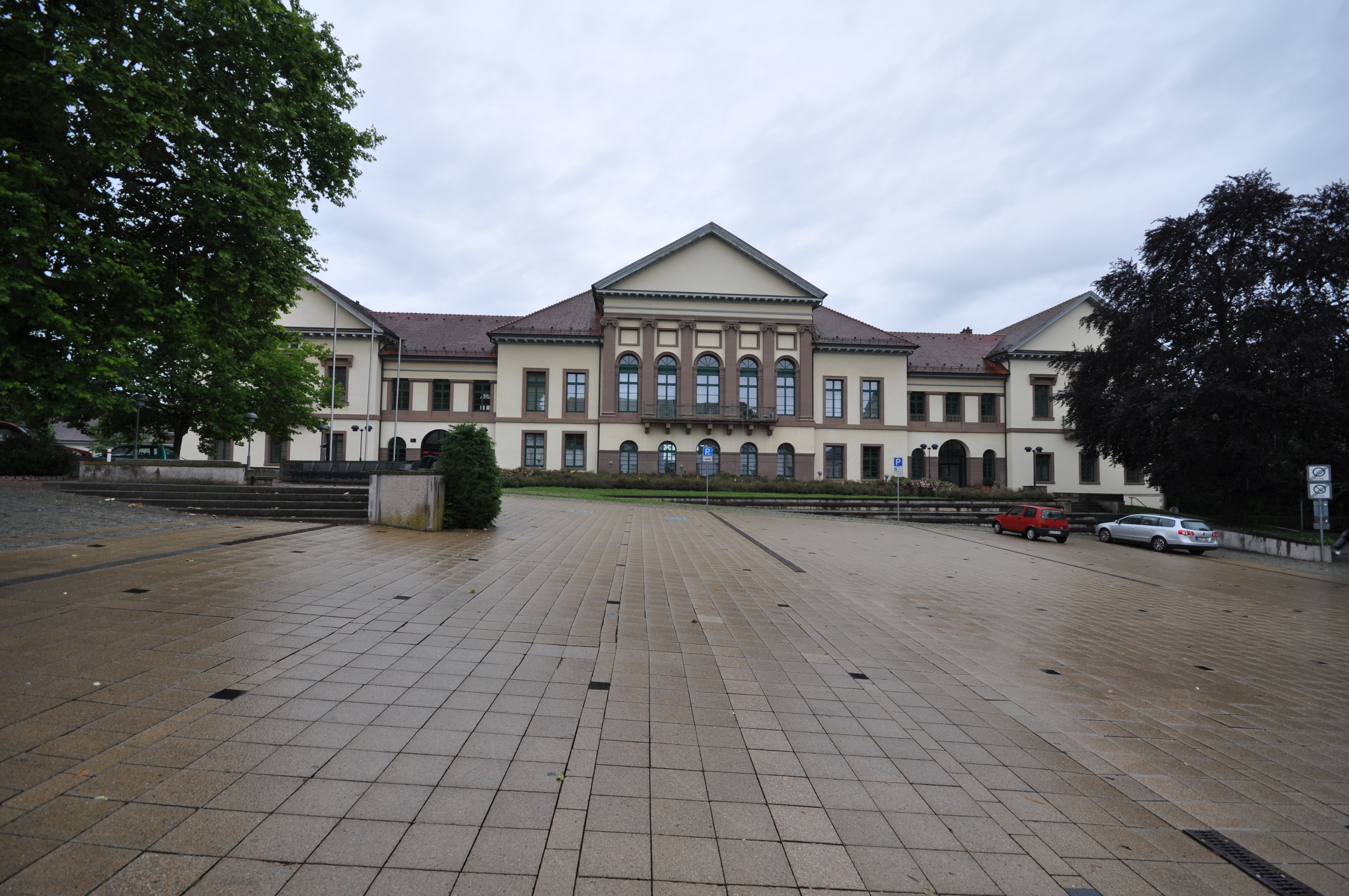 Hechingen